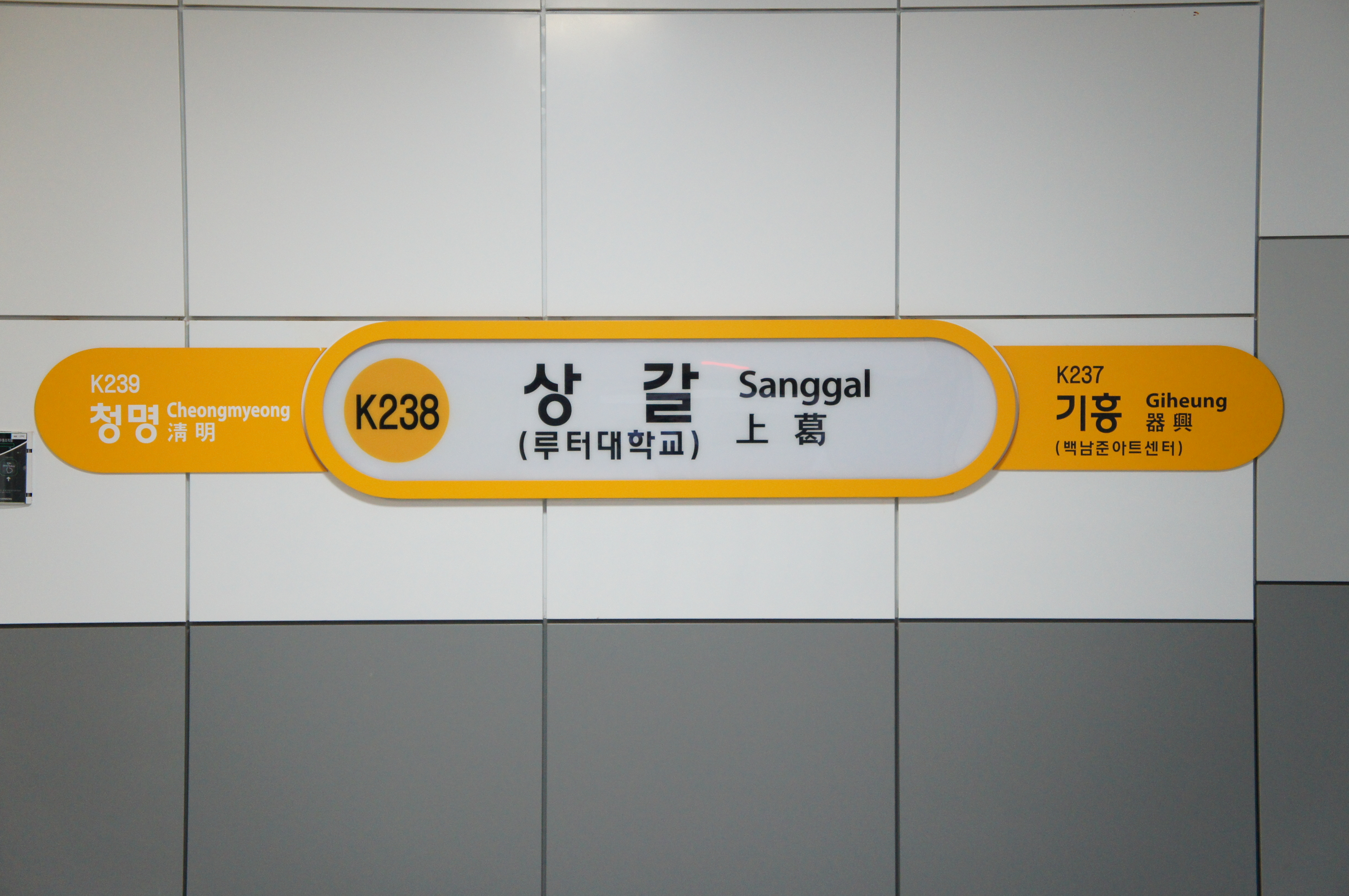 상갈역 역명판